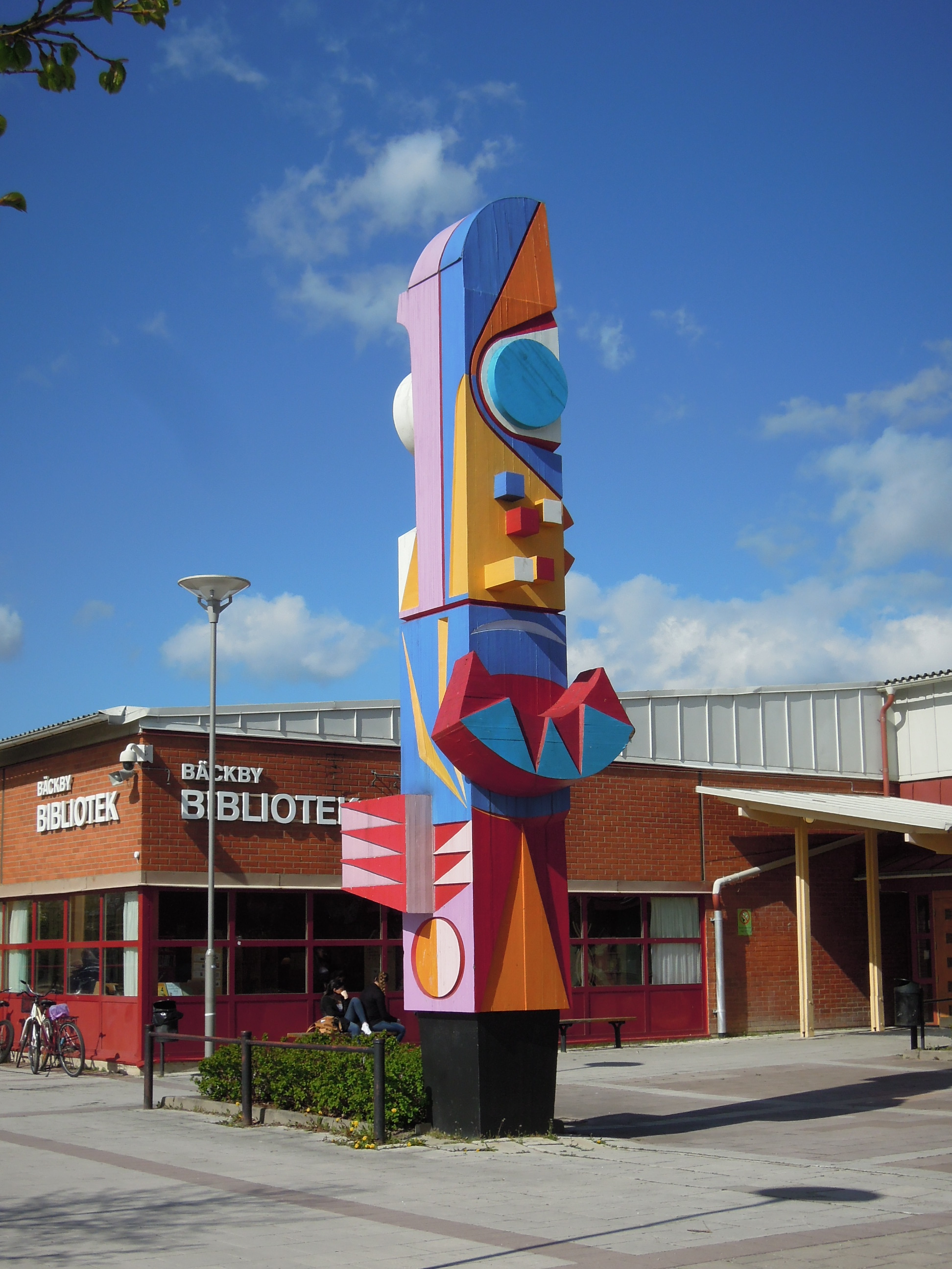 Totempåle, Osmo Isaksson, 1974, Trä. Bäckby centrum Västerås